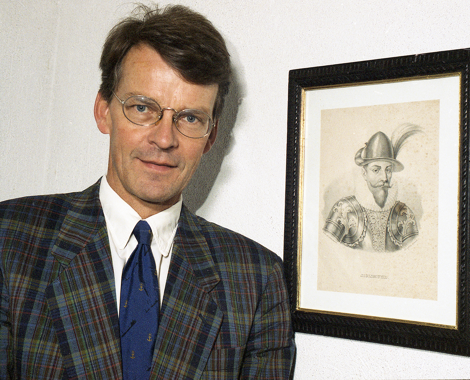 Jaan Manitski, ettevõtja ja kunstikoguja 96